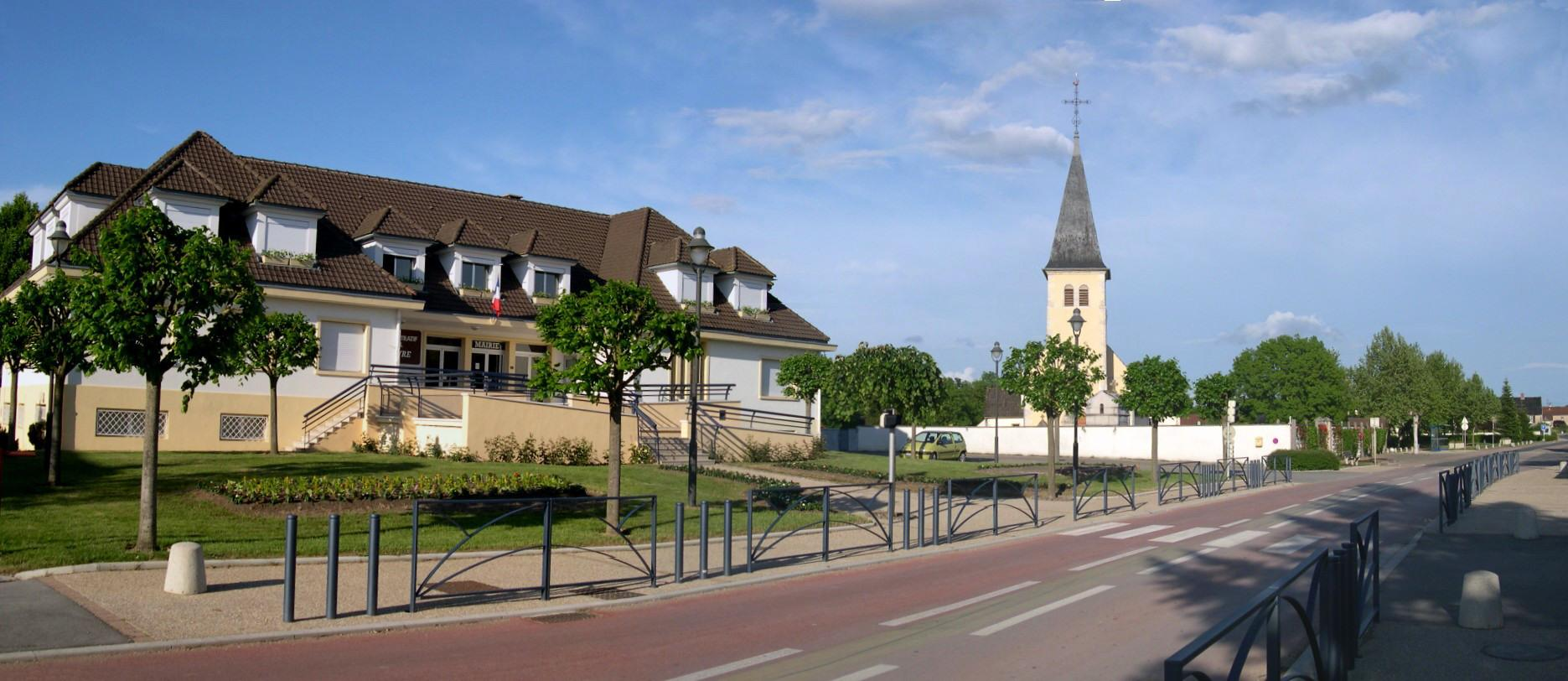 Mairie et église d'Abergement la ronce 39